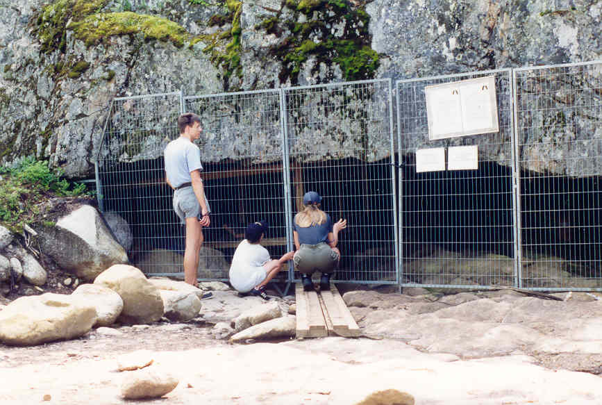 Turister utanför Varggrottan, sommaren 1998. Grottan som går in vertikalt i berget, är avstängt för allmänheten, på grund av rasrisk och för att utgrävningarna ej ska förstöras. Ett